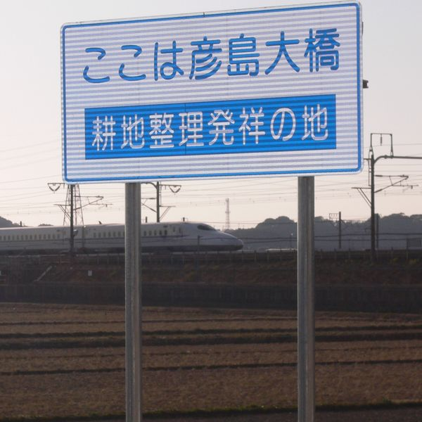 案内板画像